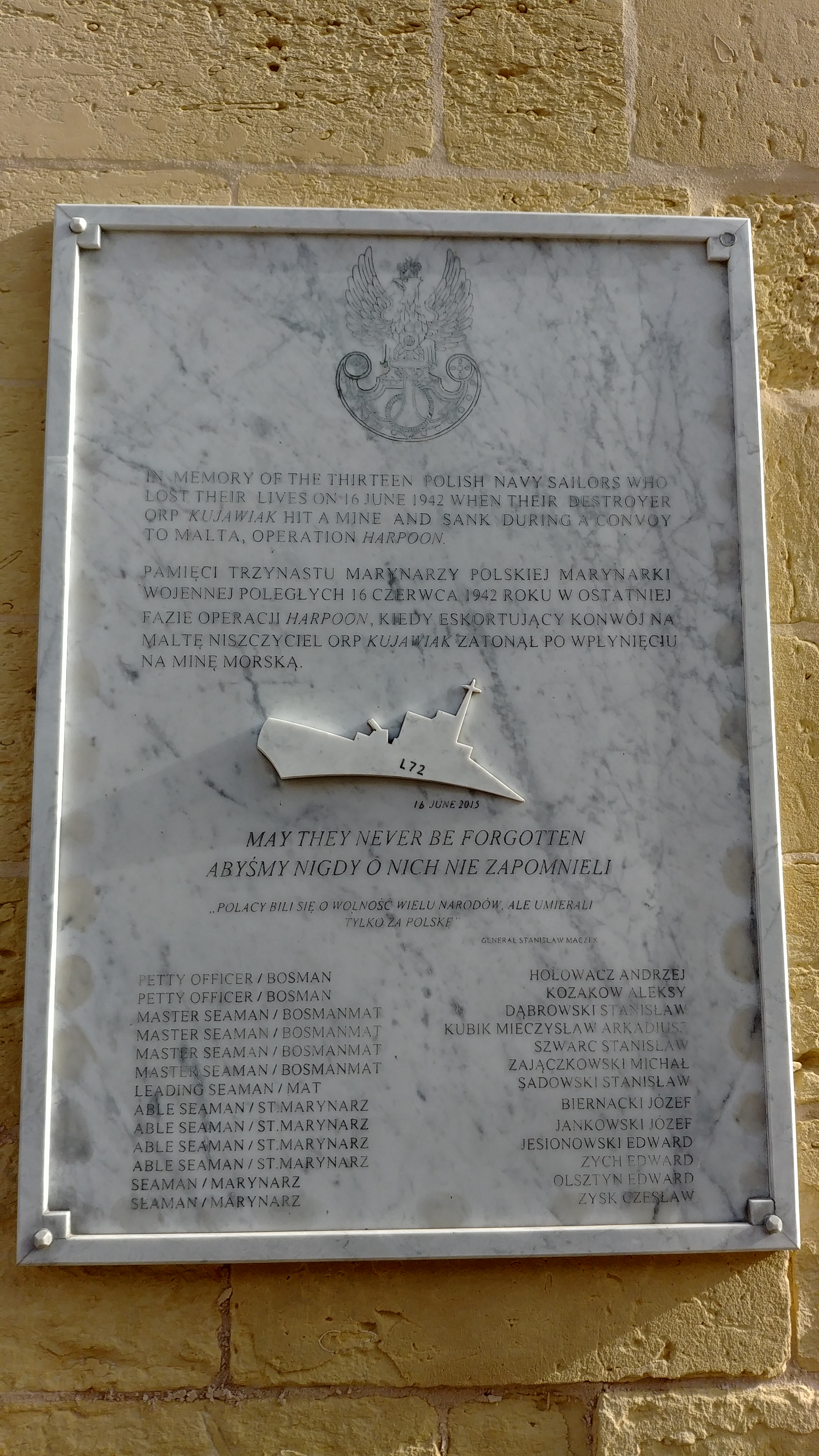 Tablica upamiętniająca zatonięcie ORP „Kujawiak”, Valetta, Malta.